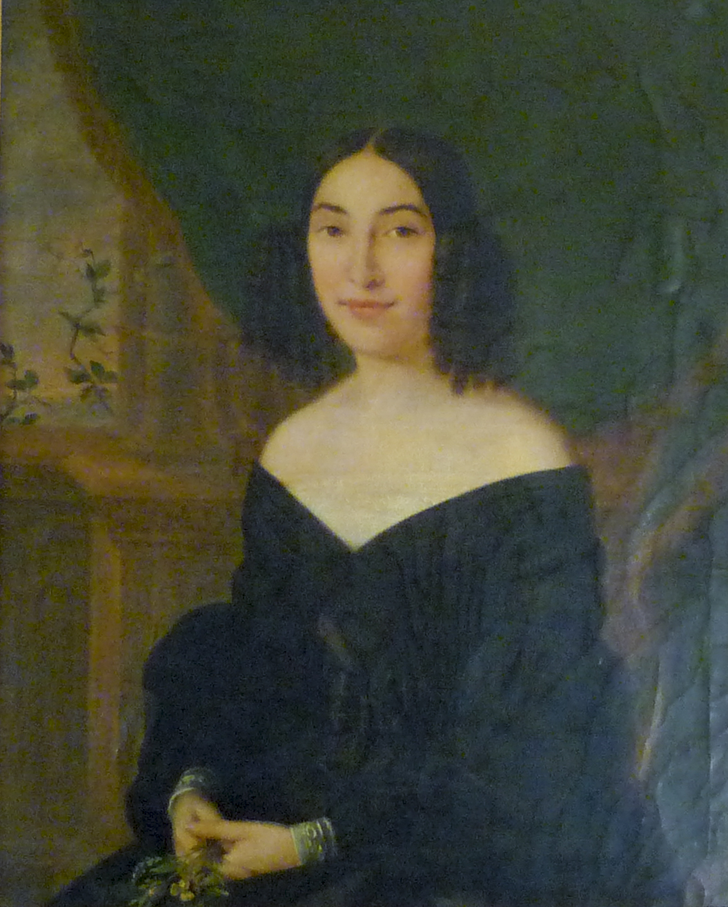 Portrait de Madame Eugène van Dievoet née Hortense Poelaert par Ignace Brice, 1840